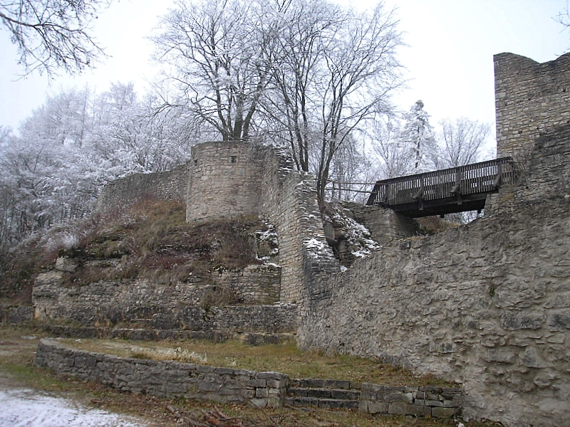 Burg Treuchtlingen (Obere Burg, Landkreis Weißenburg-Gunzenhausen, Mittelfranken). Die Südwestseite der Burg. Eigene Aufnahme, Dez. 2007 / Treuchtlingen castle (Upper castle, Middle Franconia, Bavaria, Germany). South western part of the castle. Own photo, Dec. 2007